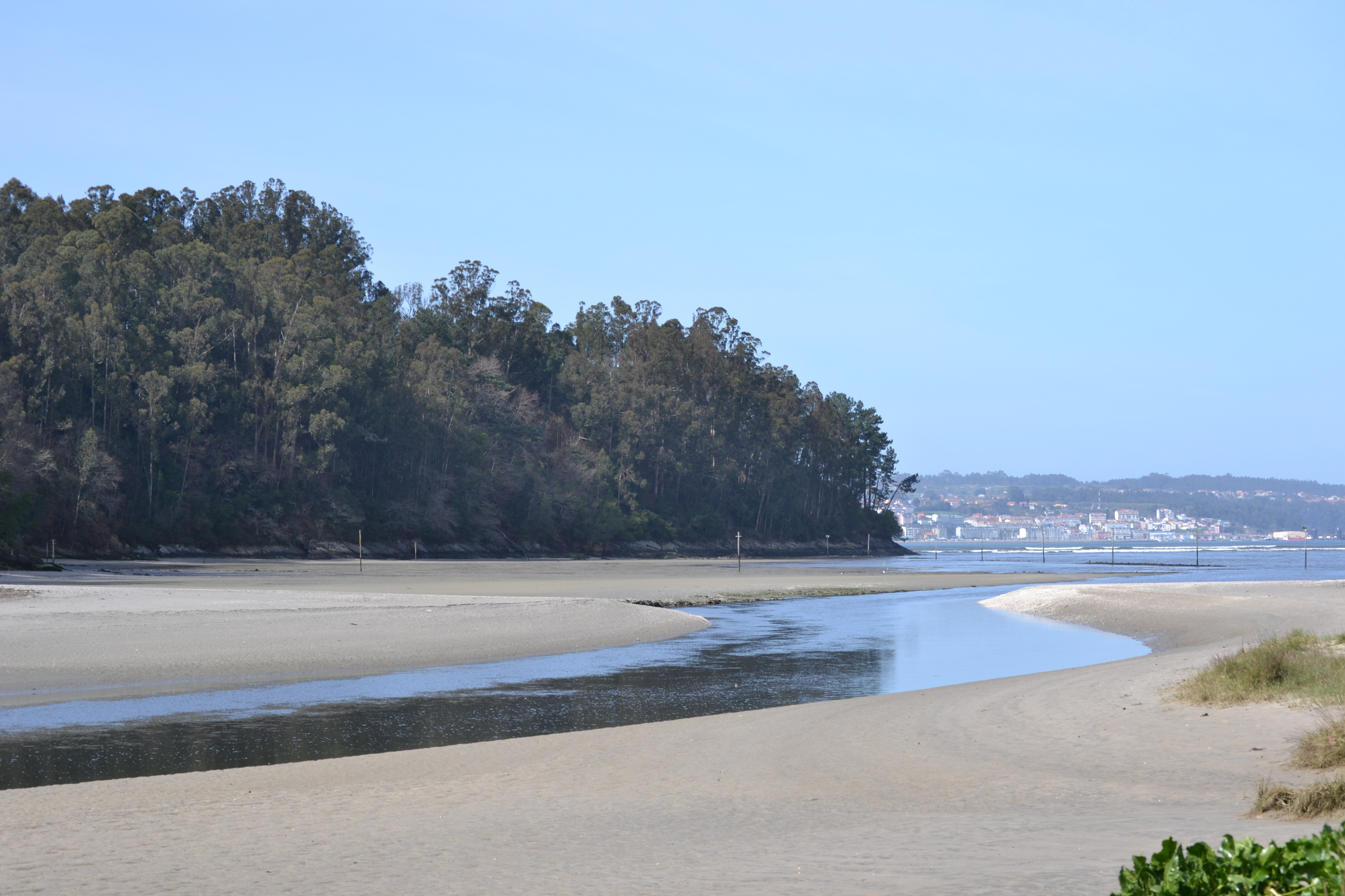 Costa Ártabra, na desembocadura do río Lambre, na Punta de Sumiño. This is a photography of a Special Area of Conservation in Spain with the ID: ES1110002. Natura2000 entry, EEA entry